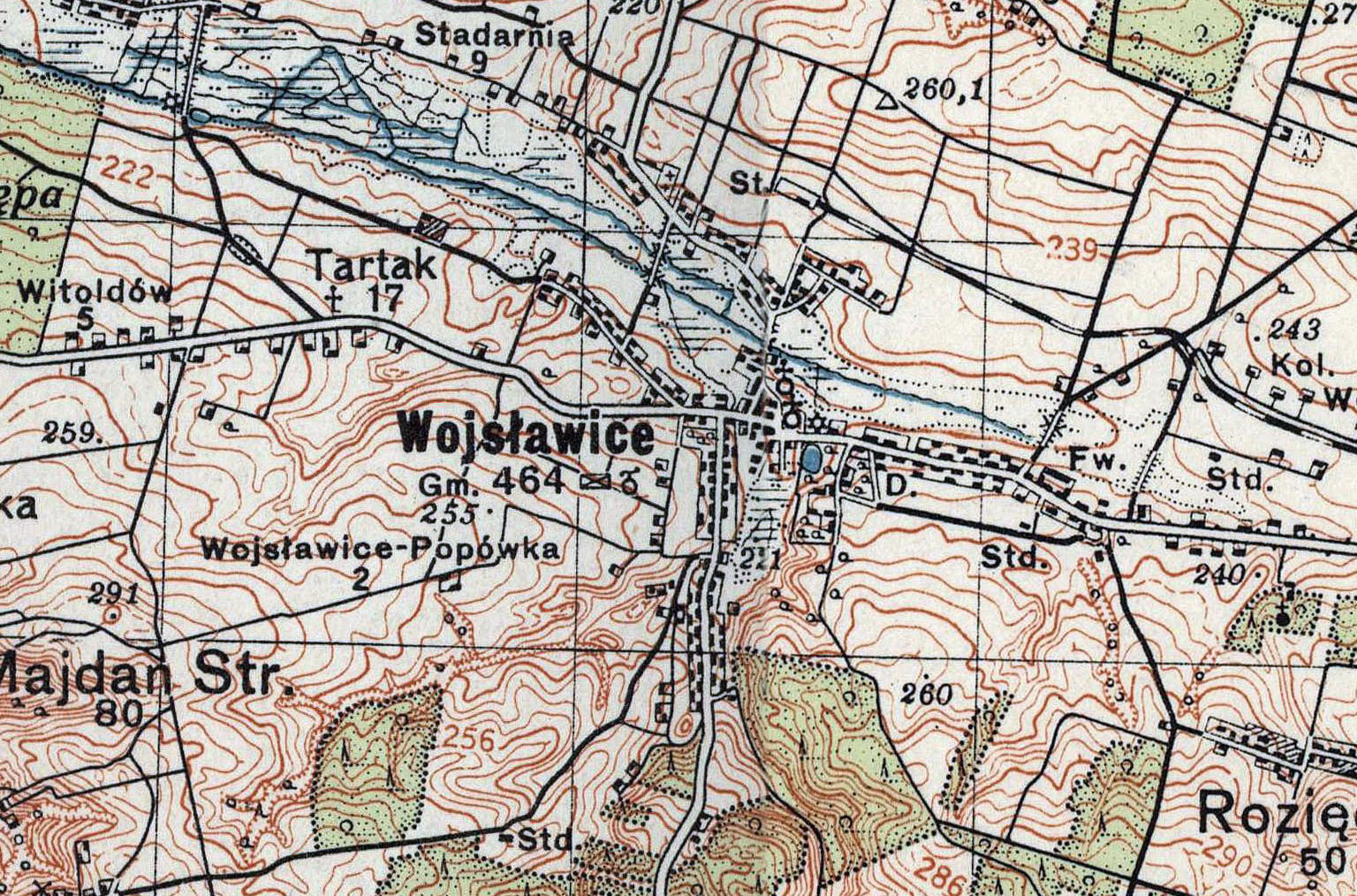 Wojskowa mapa okolic Wojsławic z 1933, wydawca Wojskowy Instytut Geograficzny, typ IV, wzór 1931, siatka QS co 2 km, południk zerowy Greenwich, 4-kolorowa (treść podstawowa - czarny, wody - niebieski, lasy - zielony, warstwice - brązowy), kolory dodatkowe: czerwony - szlaki turystyczne, fioletowy - cieniowanie.